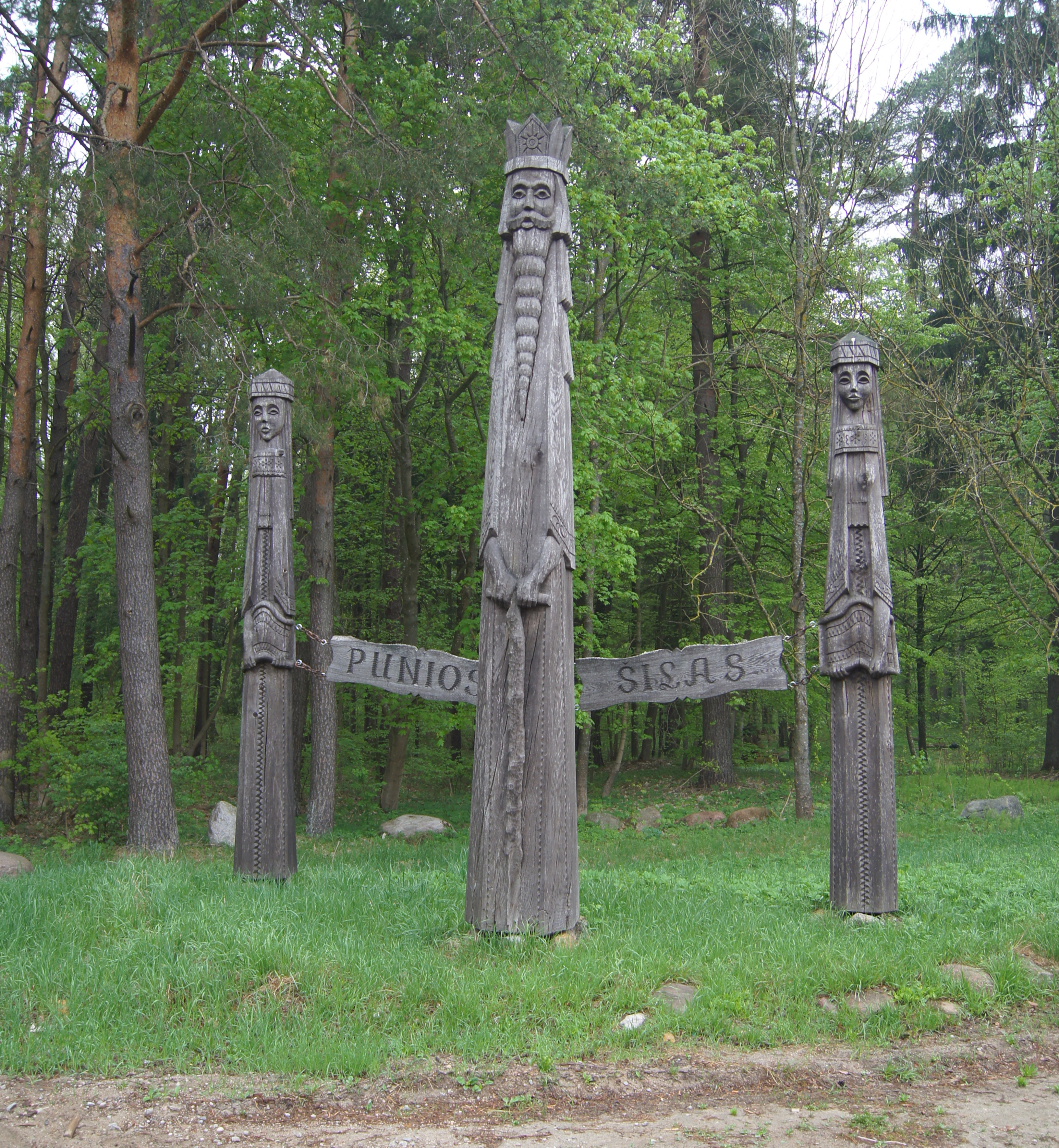 skulptūra prie įėjimo į Punios šilą.